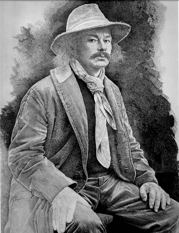 Oeuvre personnel dessiné au crayon Autoportrait n° 1 / droit a l'image de Jean-Olivier Hucleux